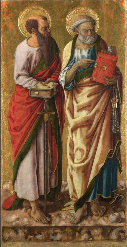 Carlo crivelli, Santi Pietro e Paolo, 87x44 cm, Londra, National Gallery